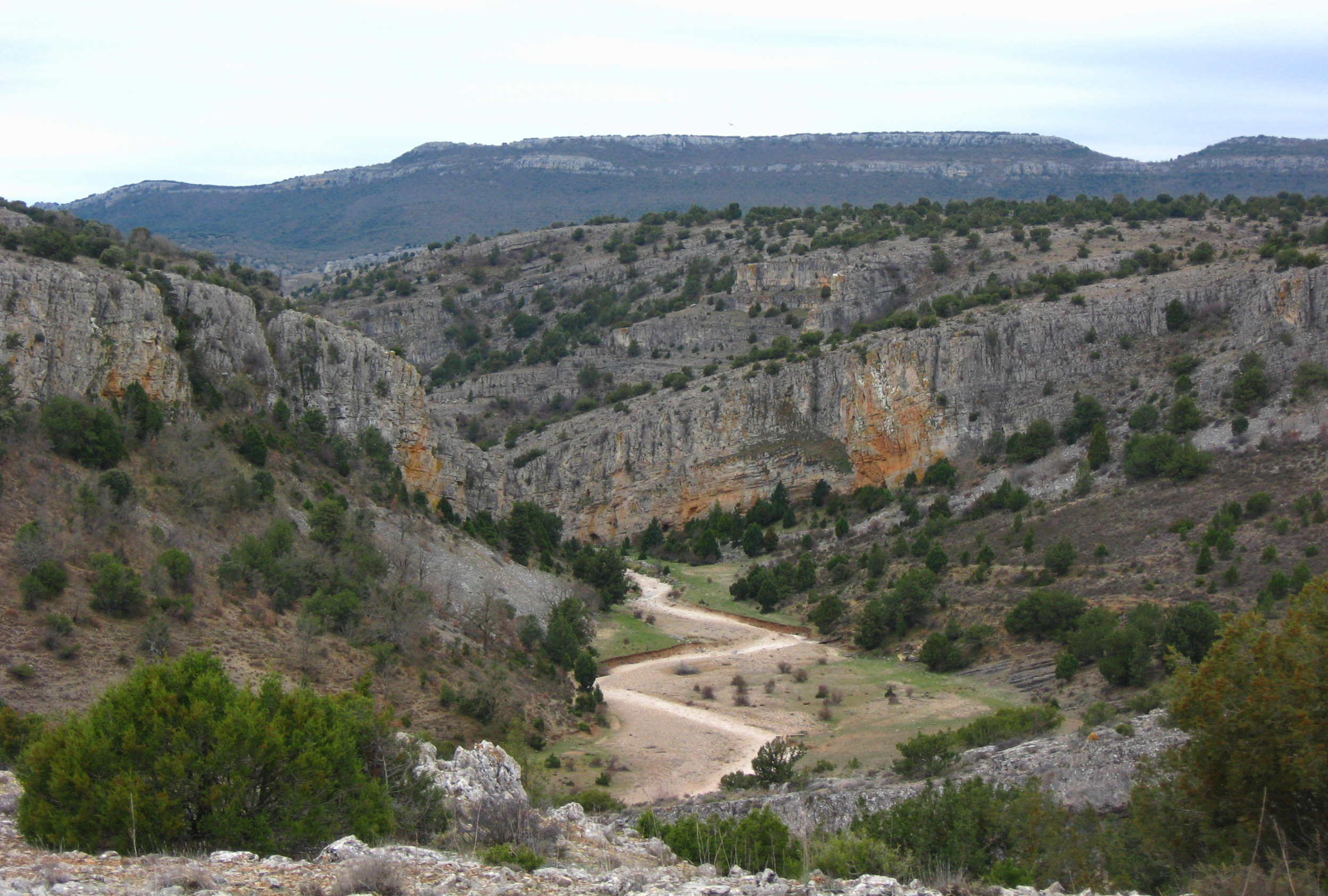 Sabinares de Ciria-Borobia This is a photography of a Site of Community Importance in Spain with the ID: ES4170056. Natura2000 entry, EEA entry